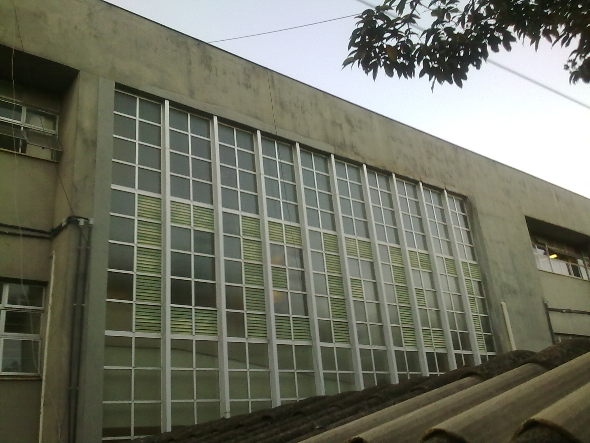 Inscrição CEFET em vidraça do prédio escolar do campus I do Centro Federal de Educação Tecnológica de Minas Gerais (CEFET-MG), em Belo Horizonte, Brasil.